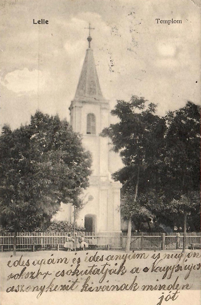 Die "zweite" katholische Pfarrkirche im Jahre 1910 (zeitgenössische Ansichtskarte)